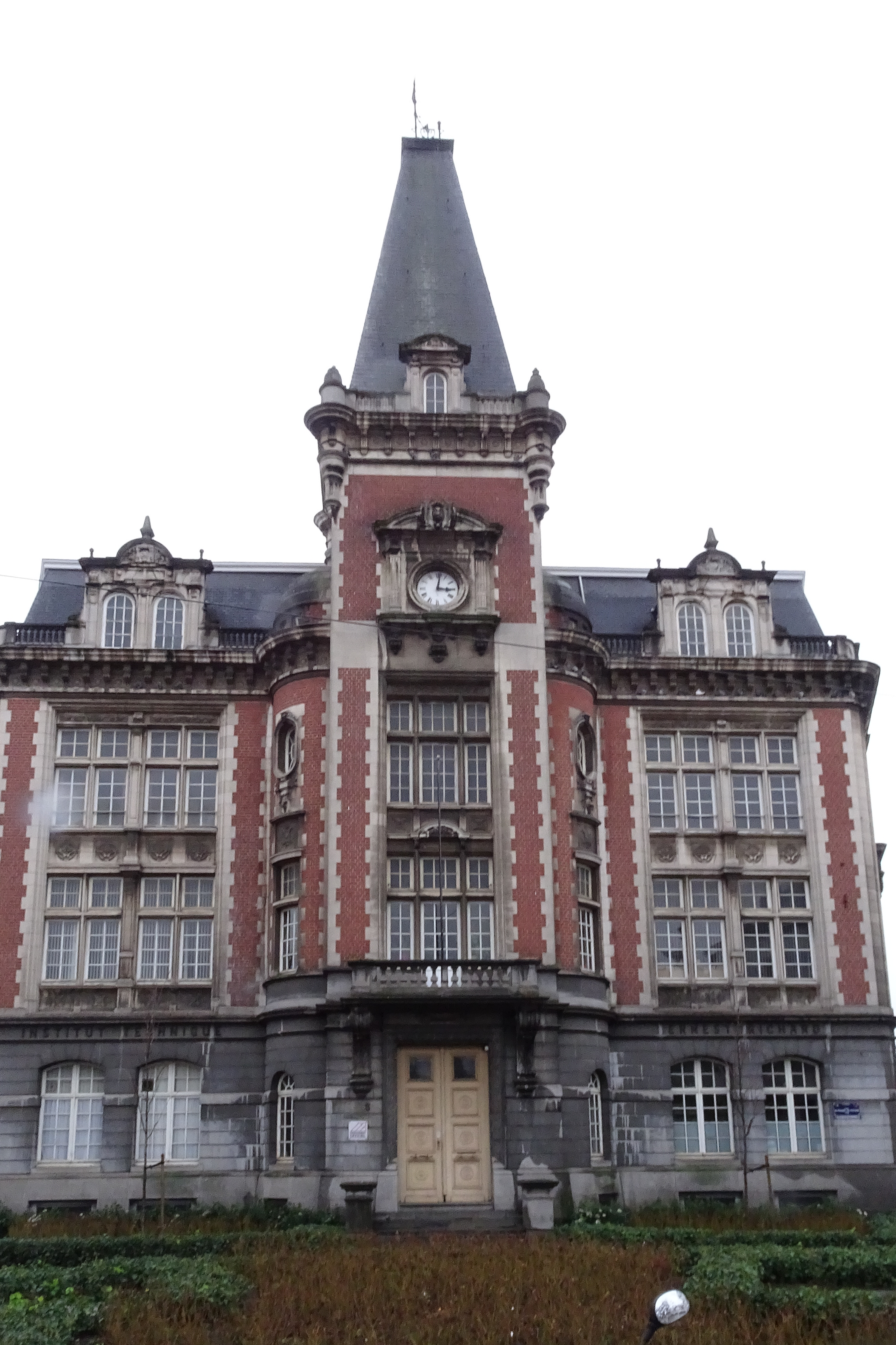 Centre d'enseignement secondaire Ernest Richard à Etterbeek, Place Saint-Pierre 4-5, Avenue de la Chasse 210-212.